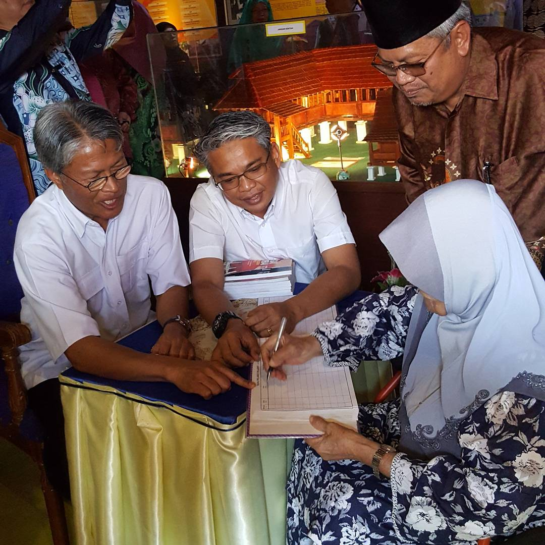 Menandatangani Buku Pelawat Disaksikan oleh YB Datuk Hasan Abd. Rahman